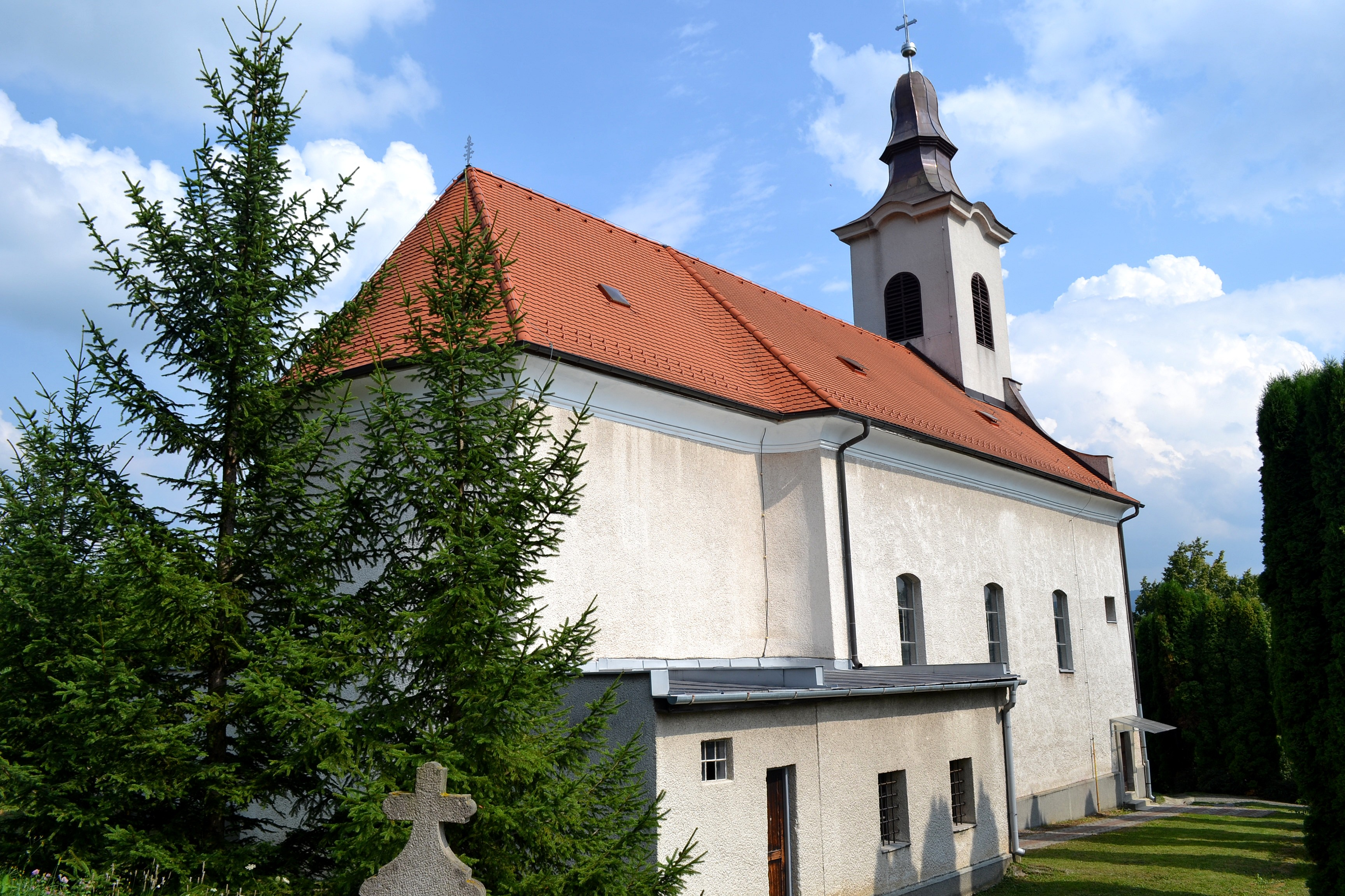 Farský barokový Kostol Všetkých svätých v Jedľových Kostoľanoch; celkový pohľad od severovýchodu